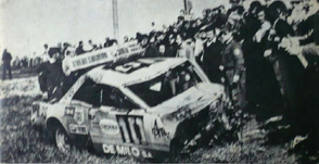 Accidente fatal del piloto César Malnatti, en la Vuelta de Pergamino de Turismo Carretera, el 5 de agosto de 1973